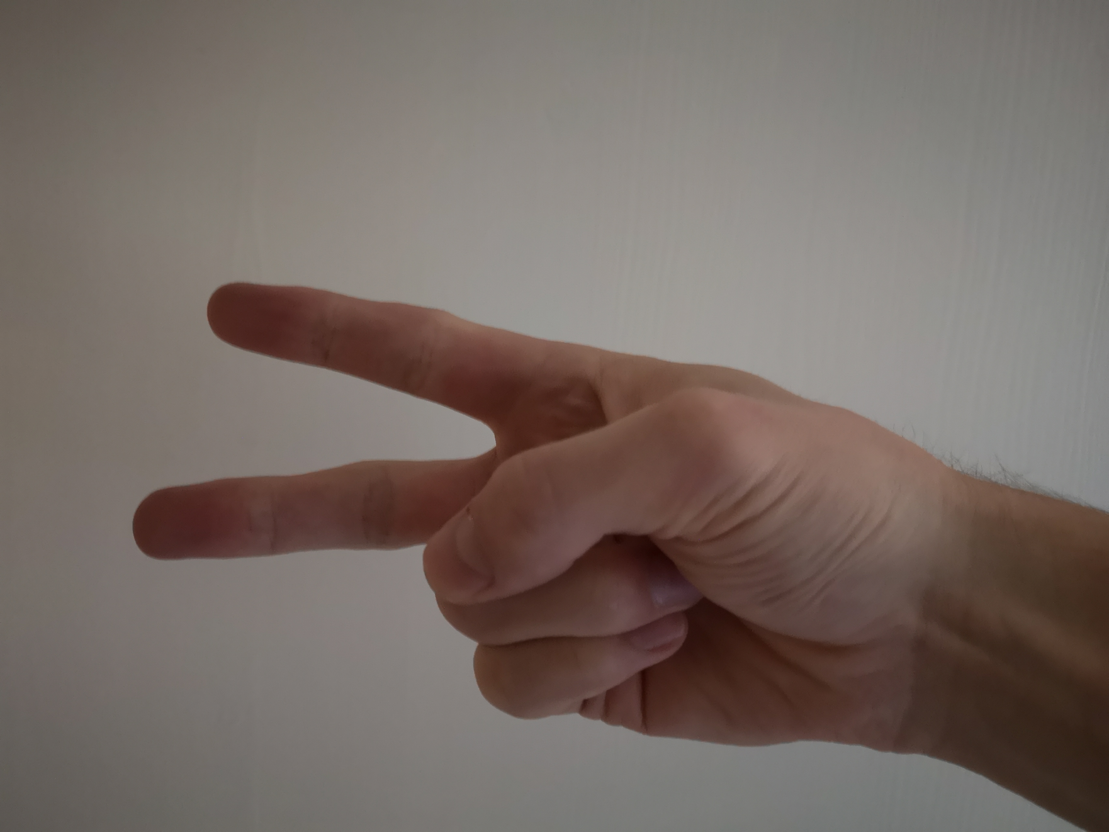 sakshånd